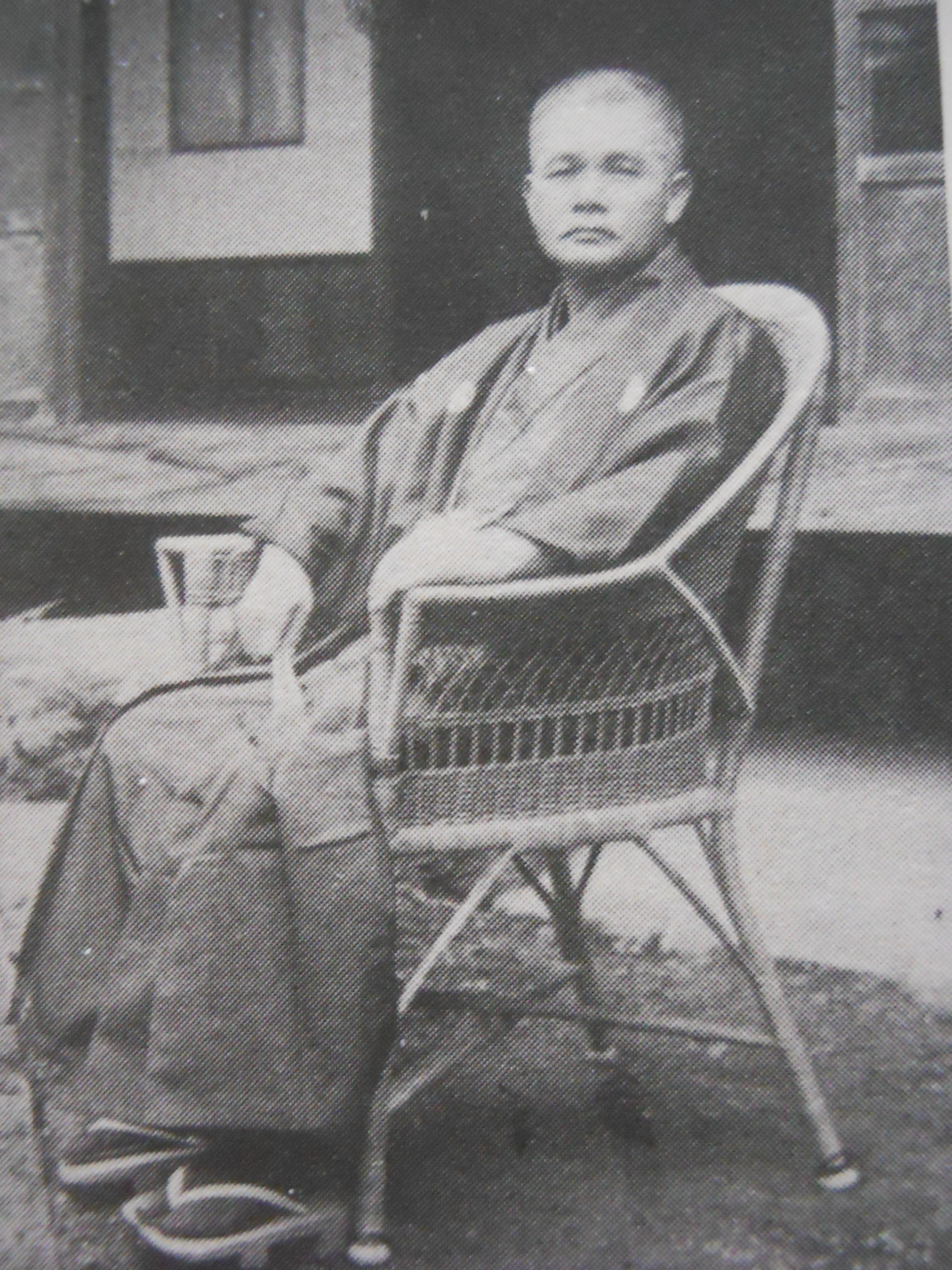 Ｍａｃｈｉｍｕｒａ Ｋｉｎｙａ